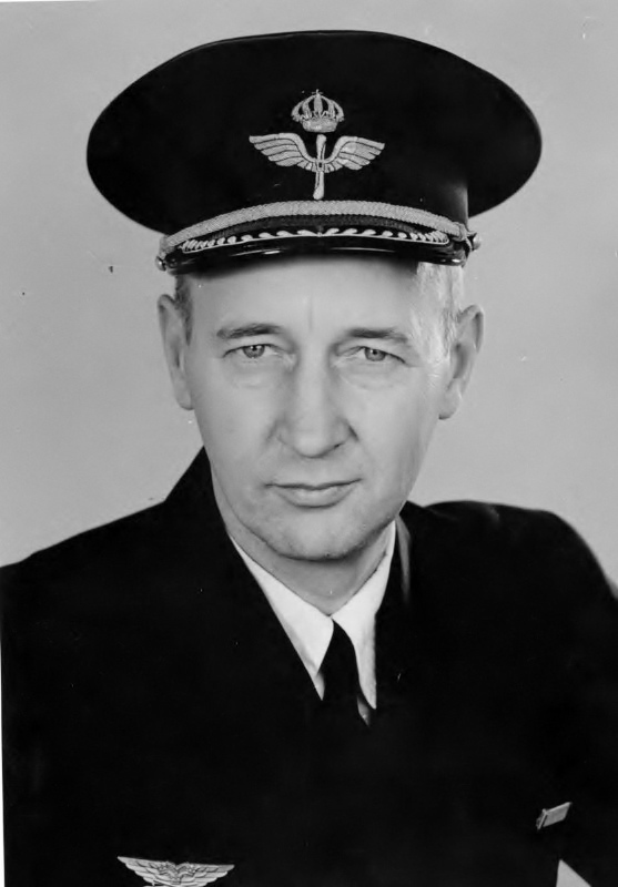 Överste Thomas Stålhandske, chef för Kalmar flygflottilj (F 12) åren 1954-1966, samt ledamot vid Statens haverikommission år 1966.